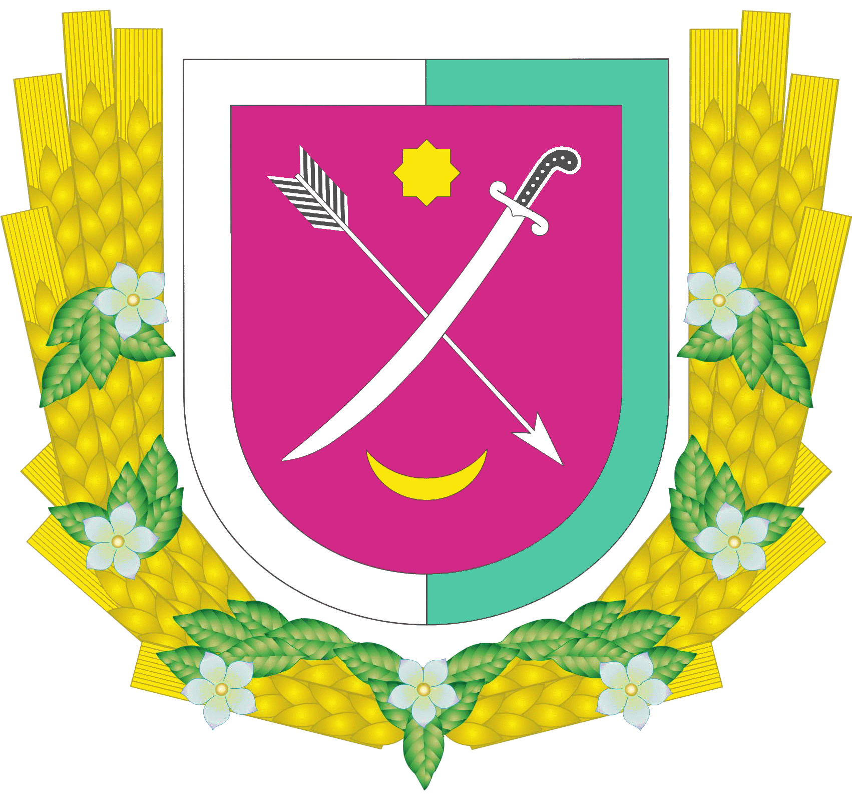 Герб Менського району